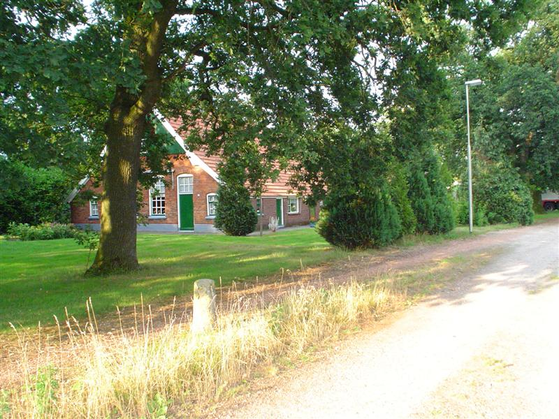 Foto van Bruinehaar